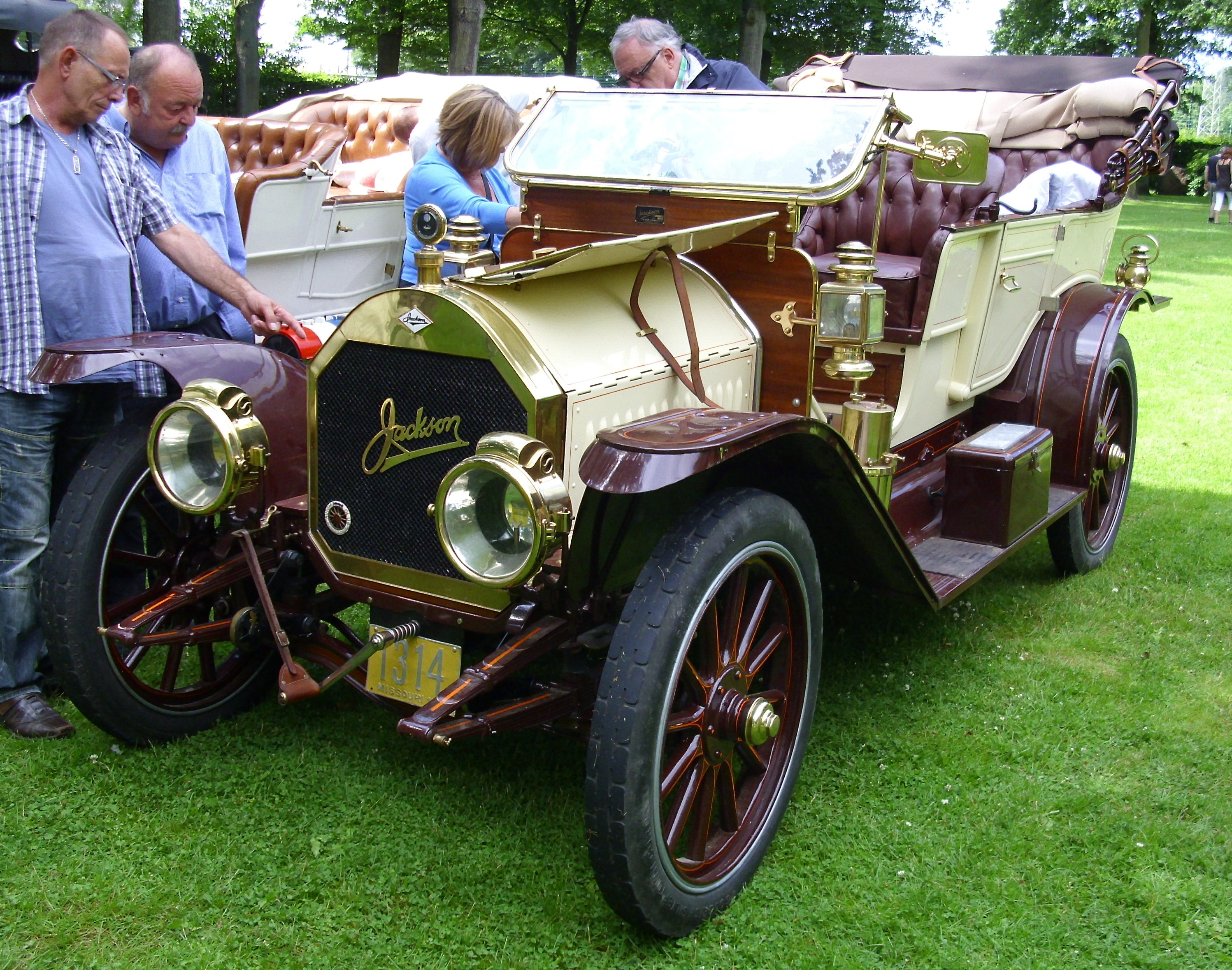 Jackson Model 41 1911